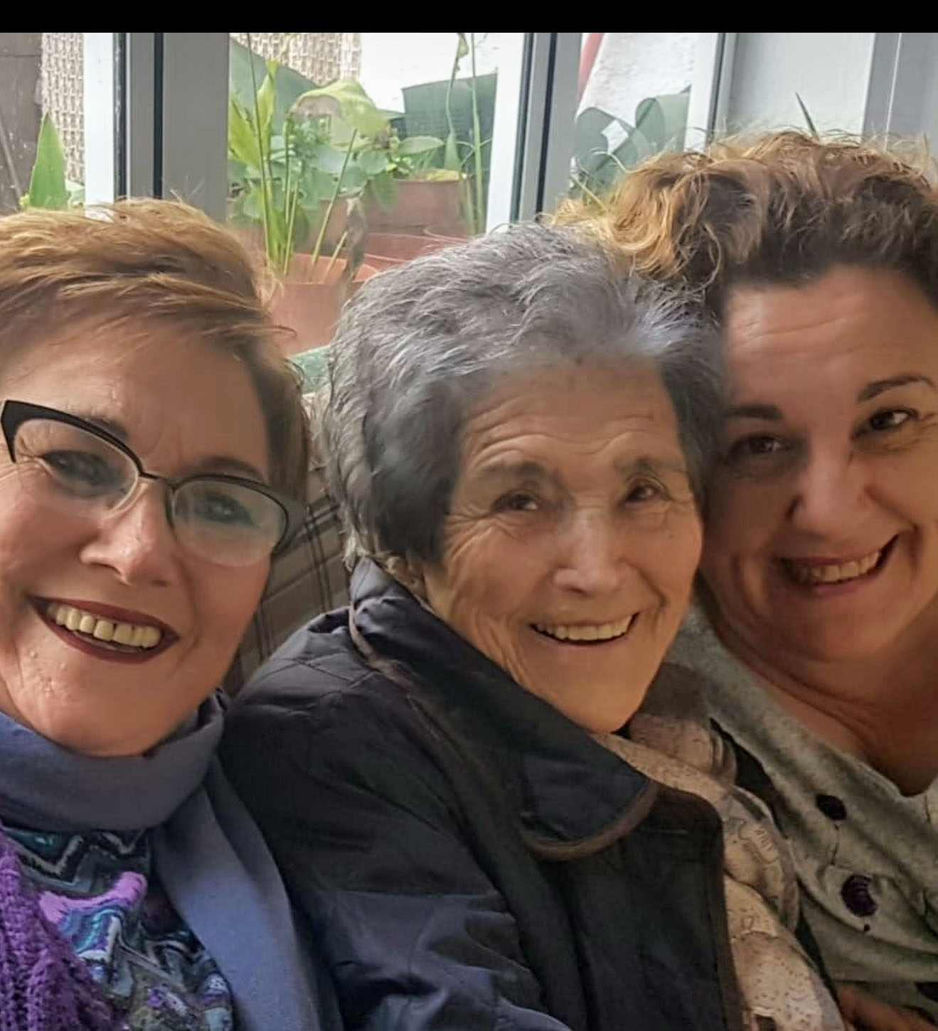 Memoria Histórica